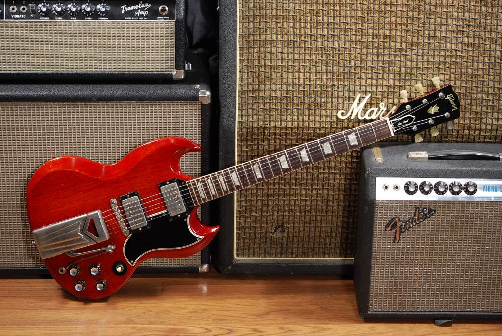 Gibson Sg